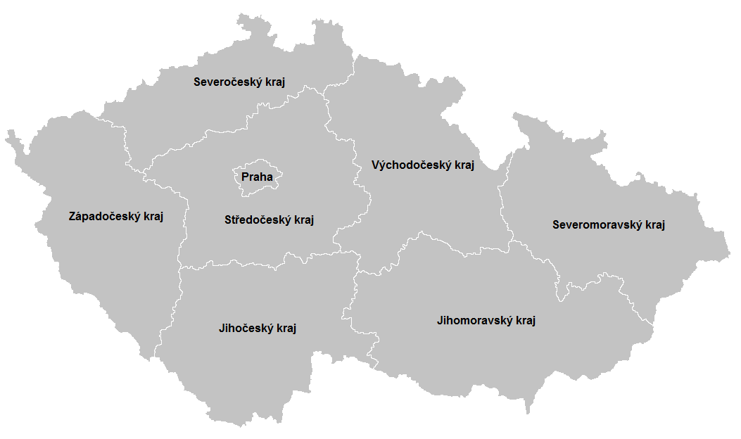 Mapka českých územních krajů (zákon č. 36/1960 Sb.)